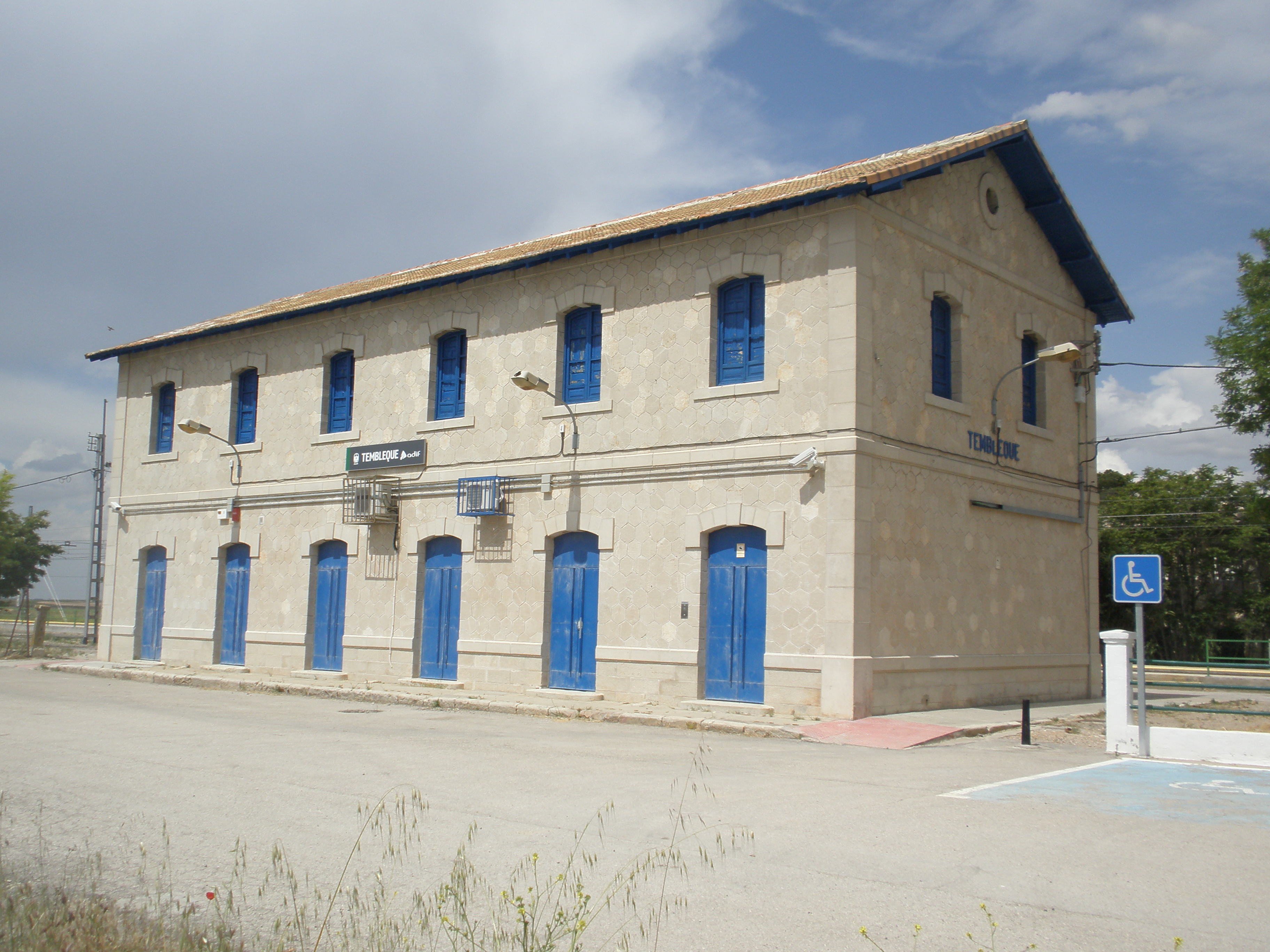 Edificio principal de la Estación de Ferrocarril de Tembleque (Toledo) España.